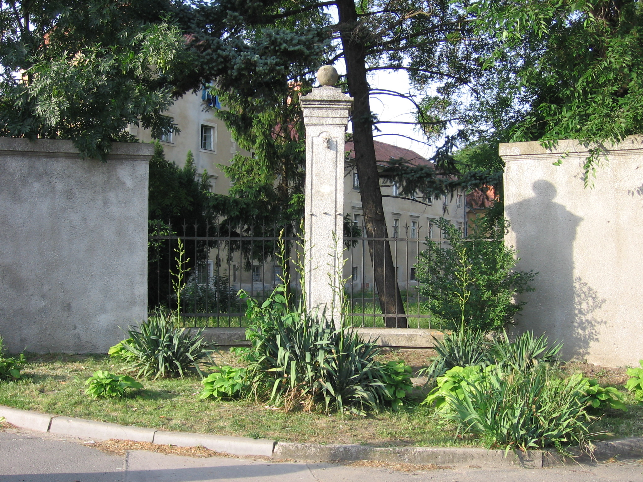 Kategória:Obrázky budov Kategória:Presunúť na Commons